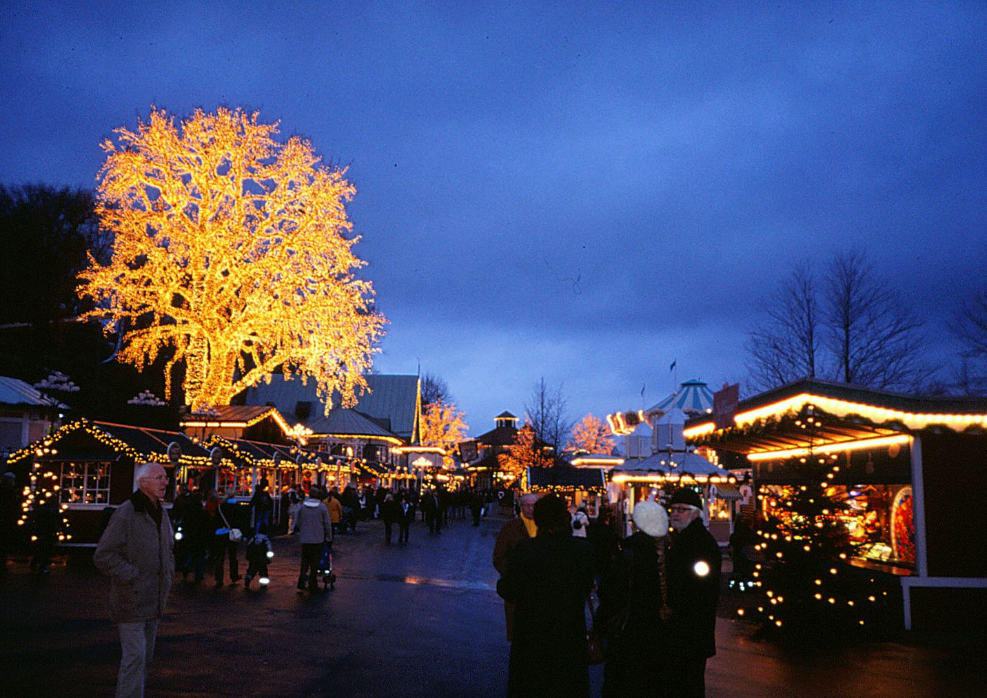 Julebelysning i Liseberg, Göteborg. 24. november 2006.